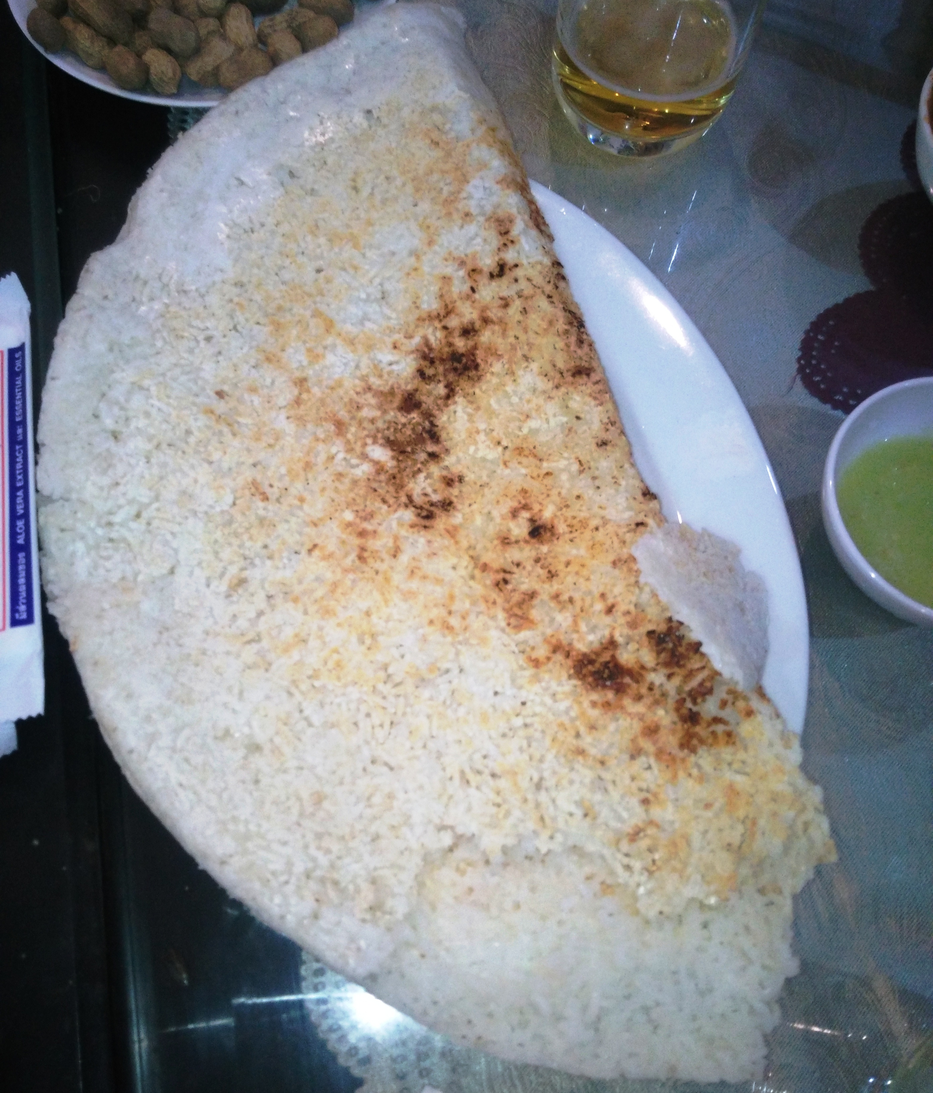 Cơm cháy kho quẹt tại Bích La Thôn-Đông Hà